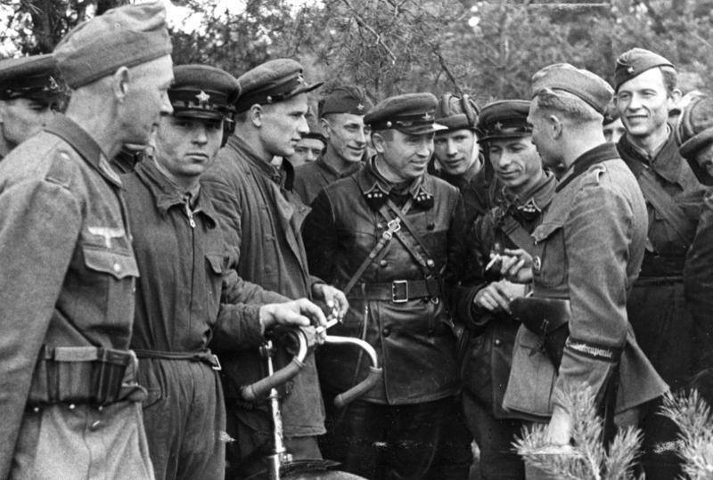 Ostwärts Brest-Litowsk Bildberichter: Ehlert Archiv-Nr.: 80/23,25 Datum 20.9.39 Erstes Zusammentreffen deutscher und russischer Truppen Als Erwiderung eines Besuches des Politischen Kommissars Borowenskij bei dem Kommandierenden General des XIX. AK, General der Panzertruppen Guderian, in Brest-Litowsk, suchten deutsche Truppen die Vorhut der russischen Armee ostwärts Brest-Litowsk auf. Die Gespräche wurden zwischen den Soldaten in kameradschaftlicher Weise geführt. Zensurvermerk: Zensiert ADN-TEXT ADN-ZB/Archiv II. Weltkrieg 1939-45, Der Feldzug in Polen; September 1939 Deutsche Soldaten im Gespräch mit sowjetischen Offizieren in einem Panzerregiment der Roten Armee östlich von Brest-Litowsk. Sie erwidern einen Besuch des sowjetischen Kommissars Borowenskij am selben Tag beim Kommandierenden General des XIX. Armeekorps Heinz Guderian in Brest-Litowsk. Aufnahme: [Max] Ehlert